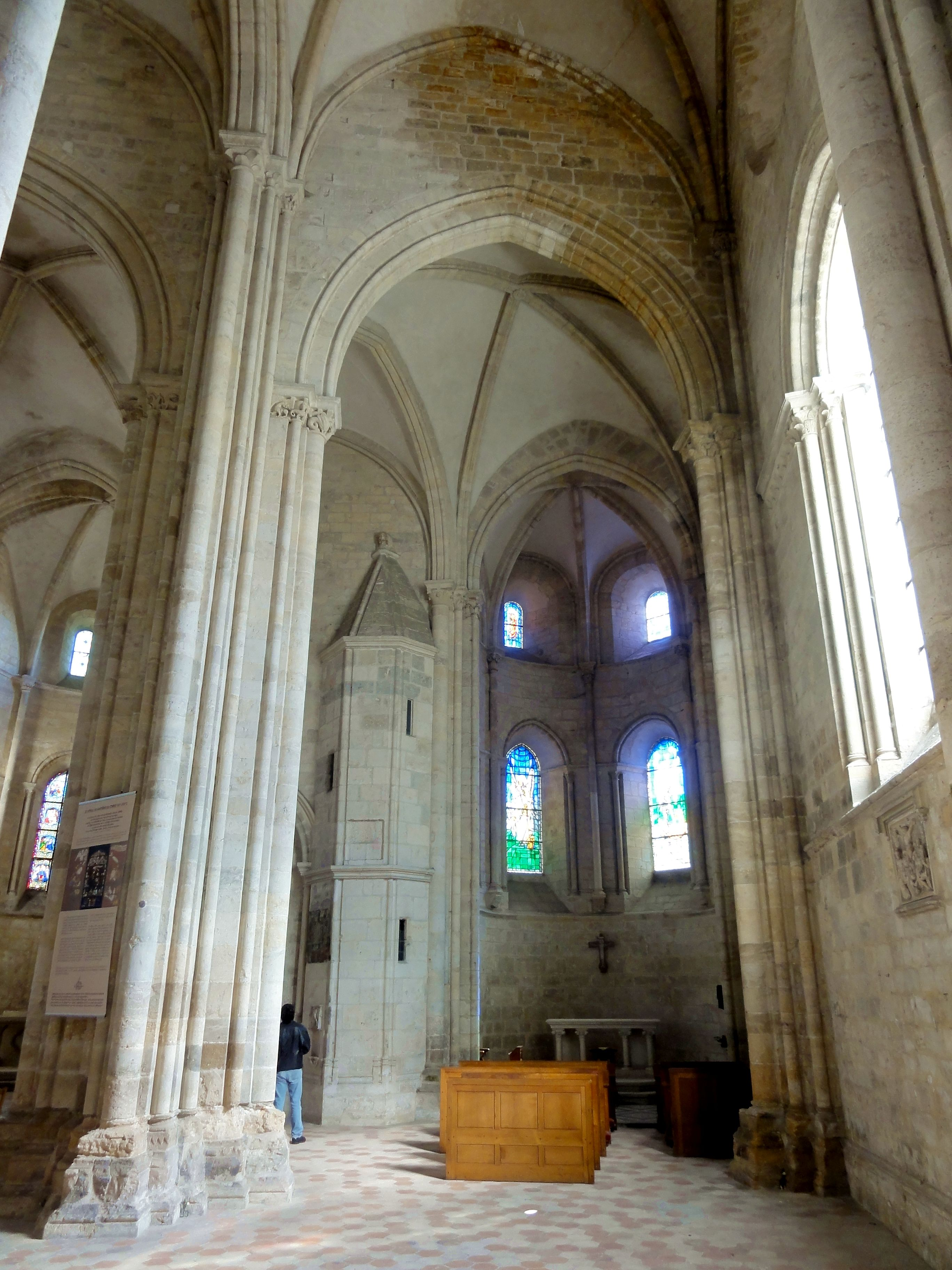 Collatéral sud, vue vers l'est.